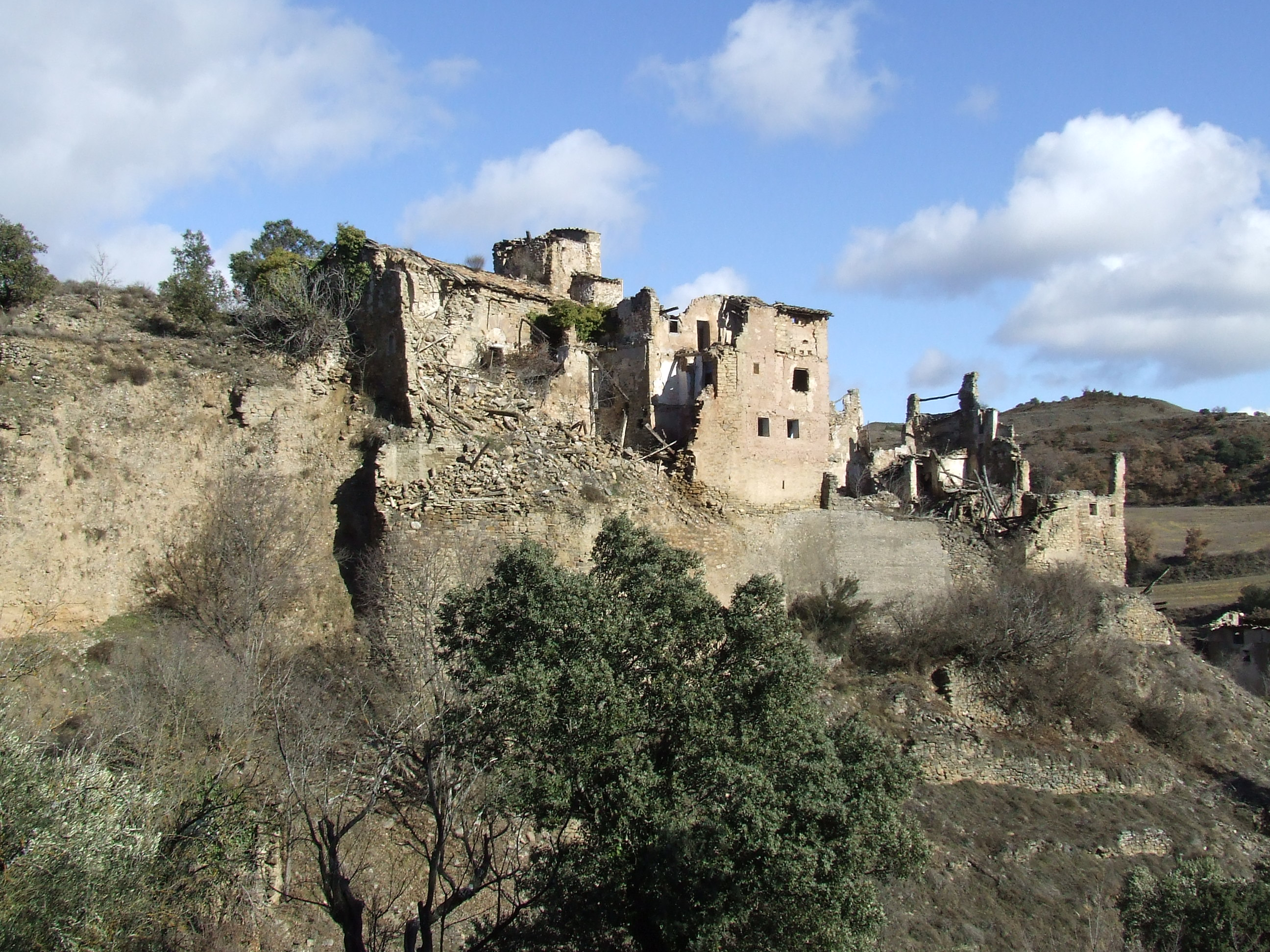 Vista del poble vell de Tendrui des del sud (Gurp de la Conca, Tremp, Pallars Jussà)